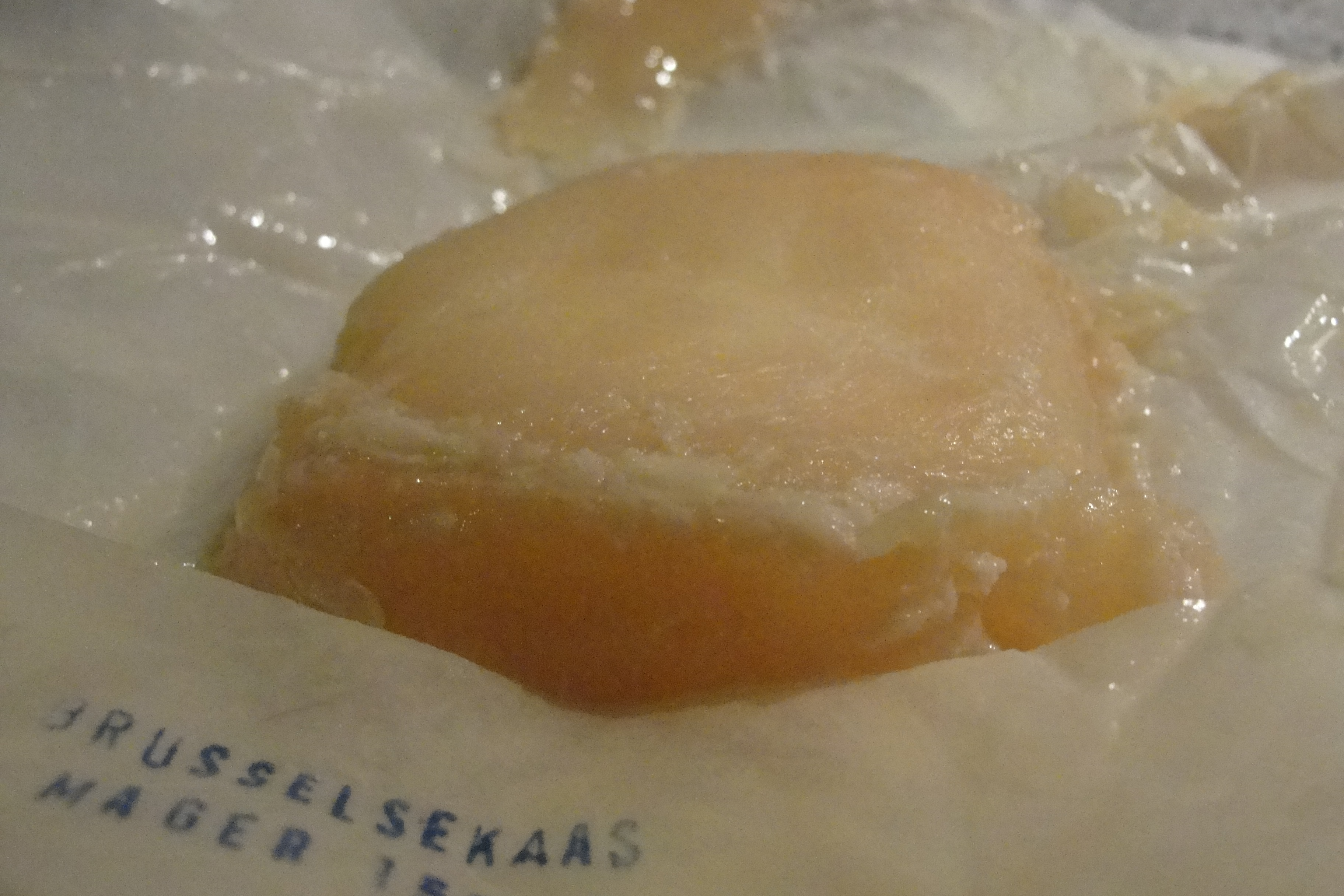 Brusselse kaas, een traditionele kaas op basis van magere melk, met 0% vetgehalte